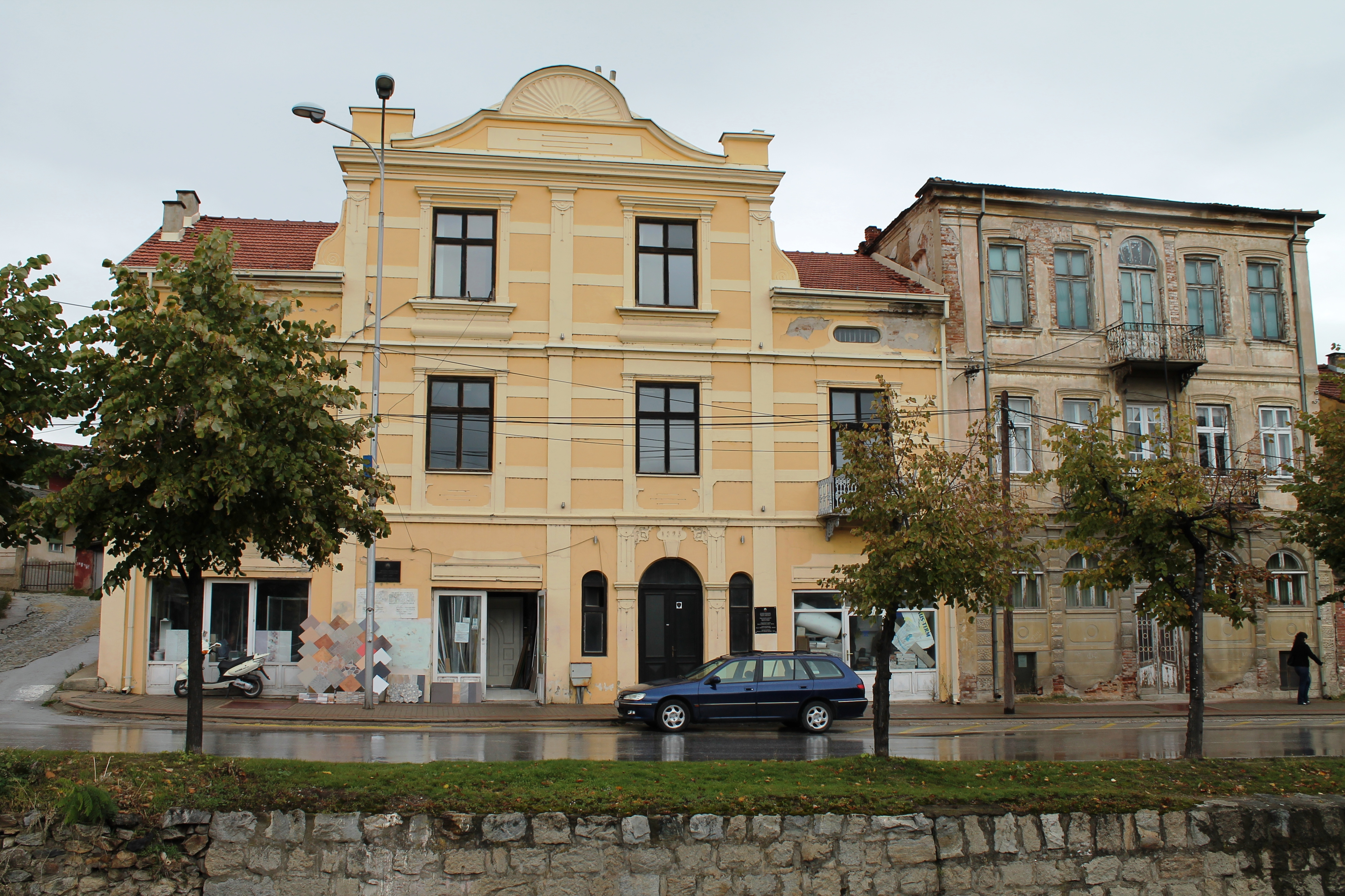 Obkti i dikurshëm i Hotelit Iliria, ku u mbajt Kongresi i Manastirit - Kongresi i Alfabetit të gjuhës shqipe,14 nëntor - 22 nëntor 1908